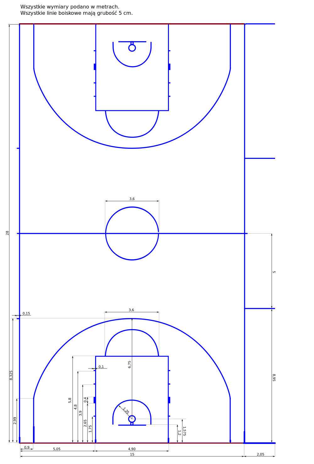 boisko do koszykówki